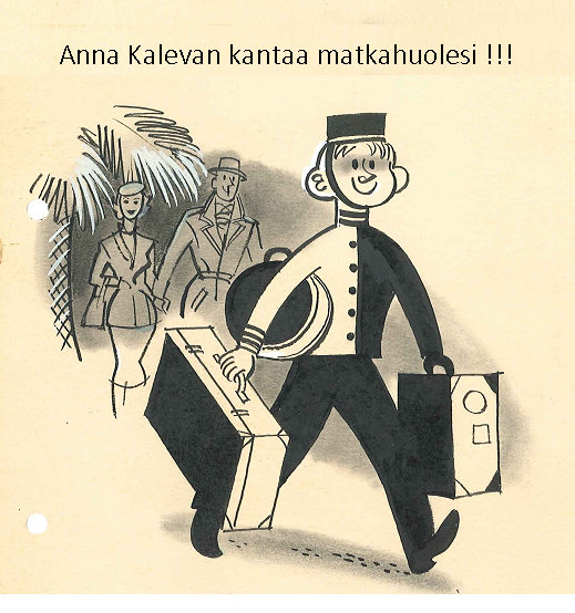 Pikkolo logo